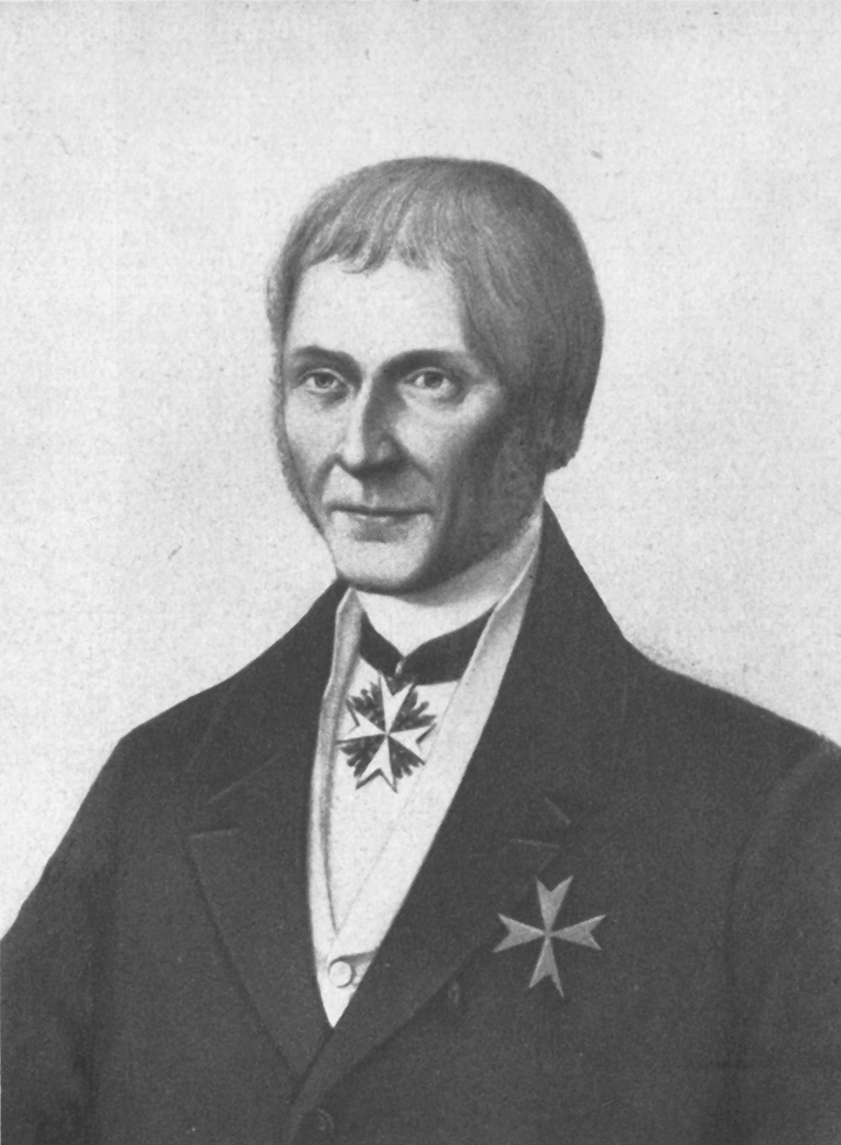 Philipp von Borries (1778-1838), Bürgermeister, Landrat und Abgeordneter der Reichsstände des Königreichs Westphalen